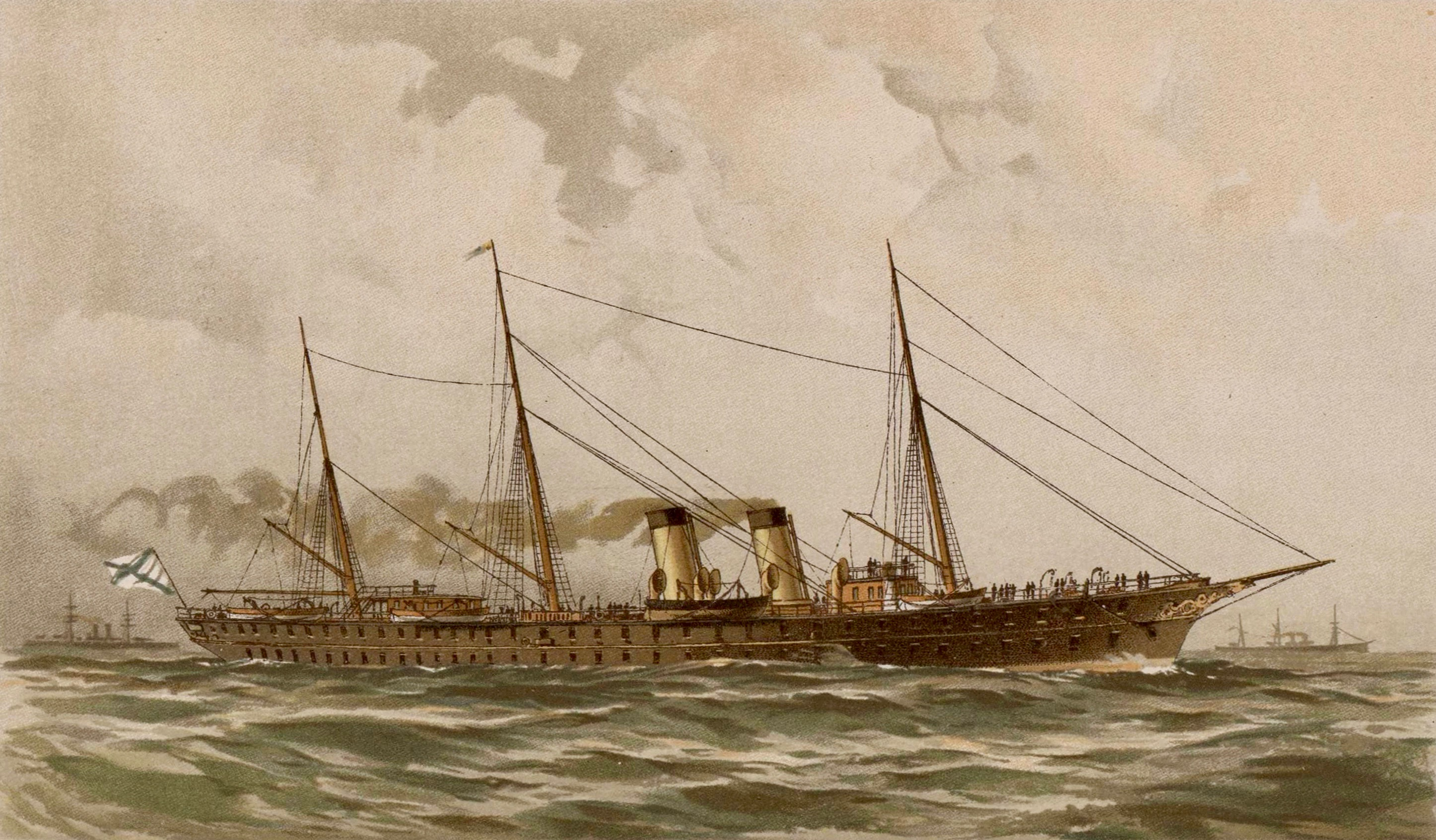 Polyarnaya Zvezda (yacht)